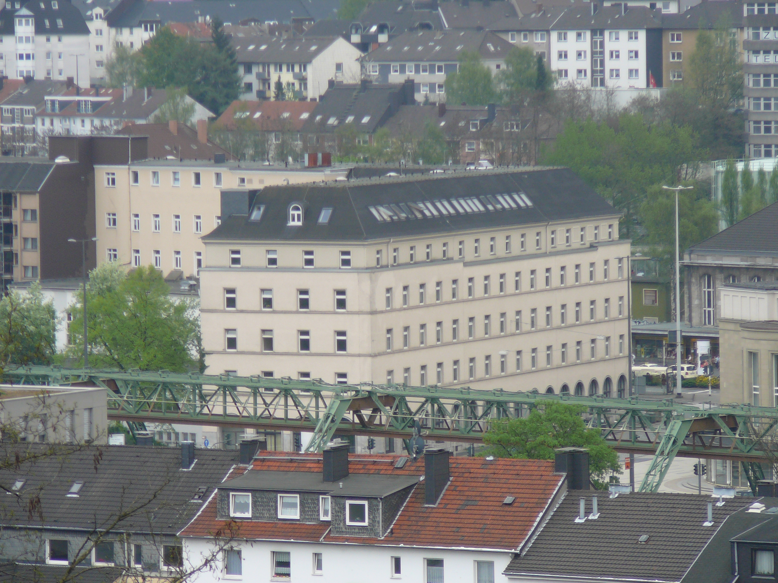 Tannenstraße, Wuppertal